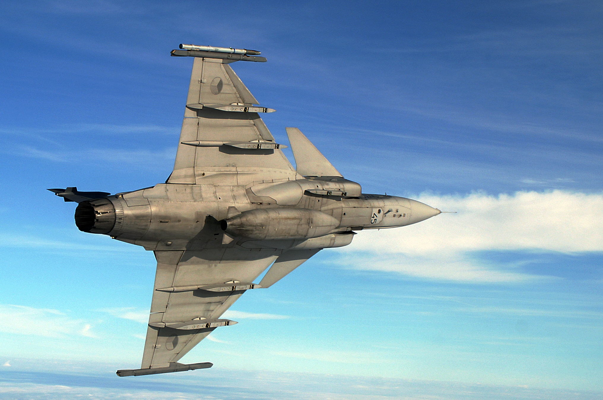 steep turn